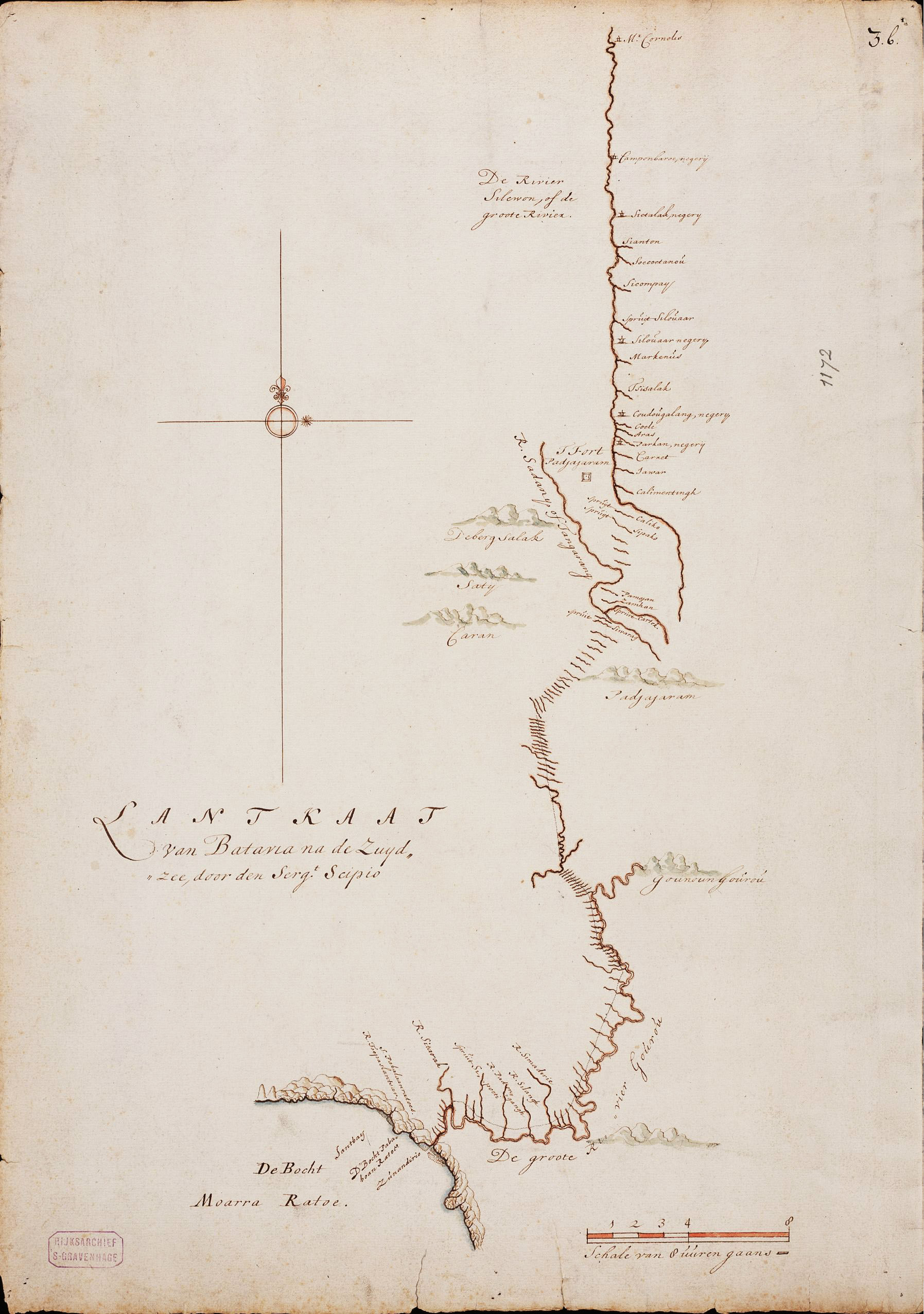 Titel catalogus Leupe (NA): - Datering ca. 1695 naar een situatie van ca.1687. - Rechtsboven genummerd: - Atlas Amsterdam. - Notities verso